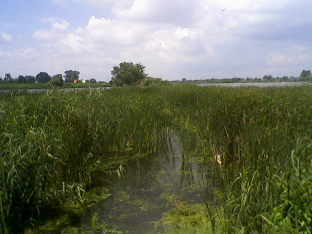 Nature reserve Stawy Raszyńskie.// Rezerwat przyrody Stawy Raszyńskie.